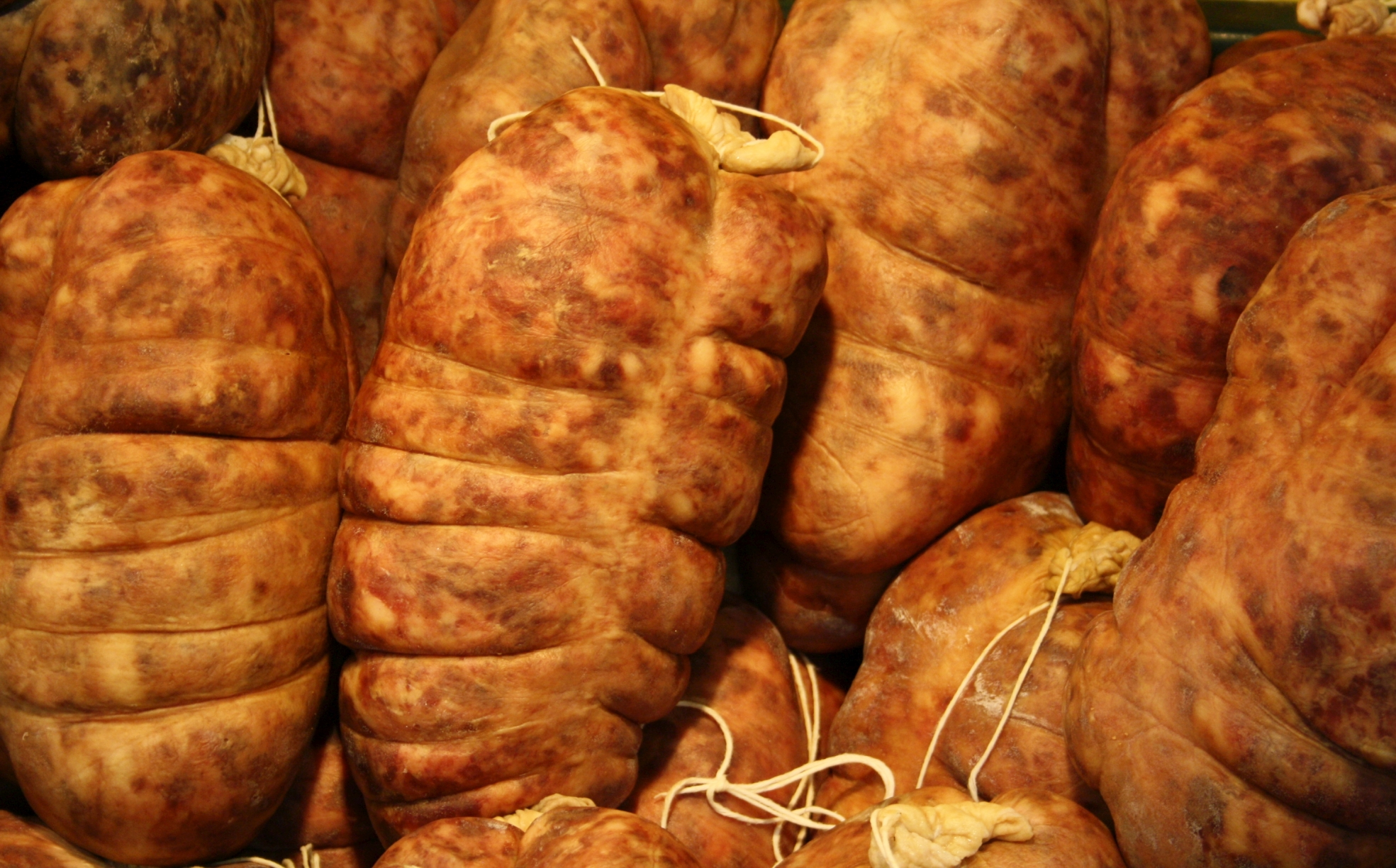 andouille de Charlieu, Loire, France. Salon Cochons et Traditions à Andrézieux-Bouthéon.